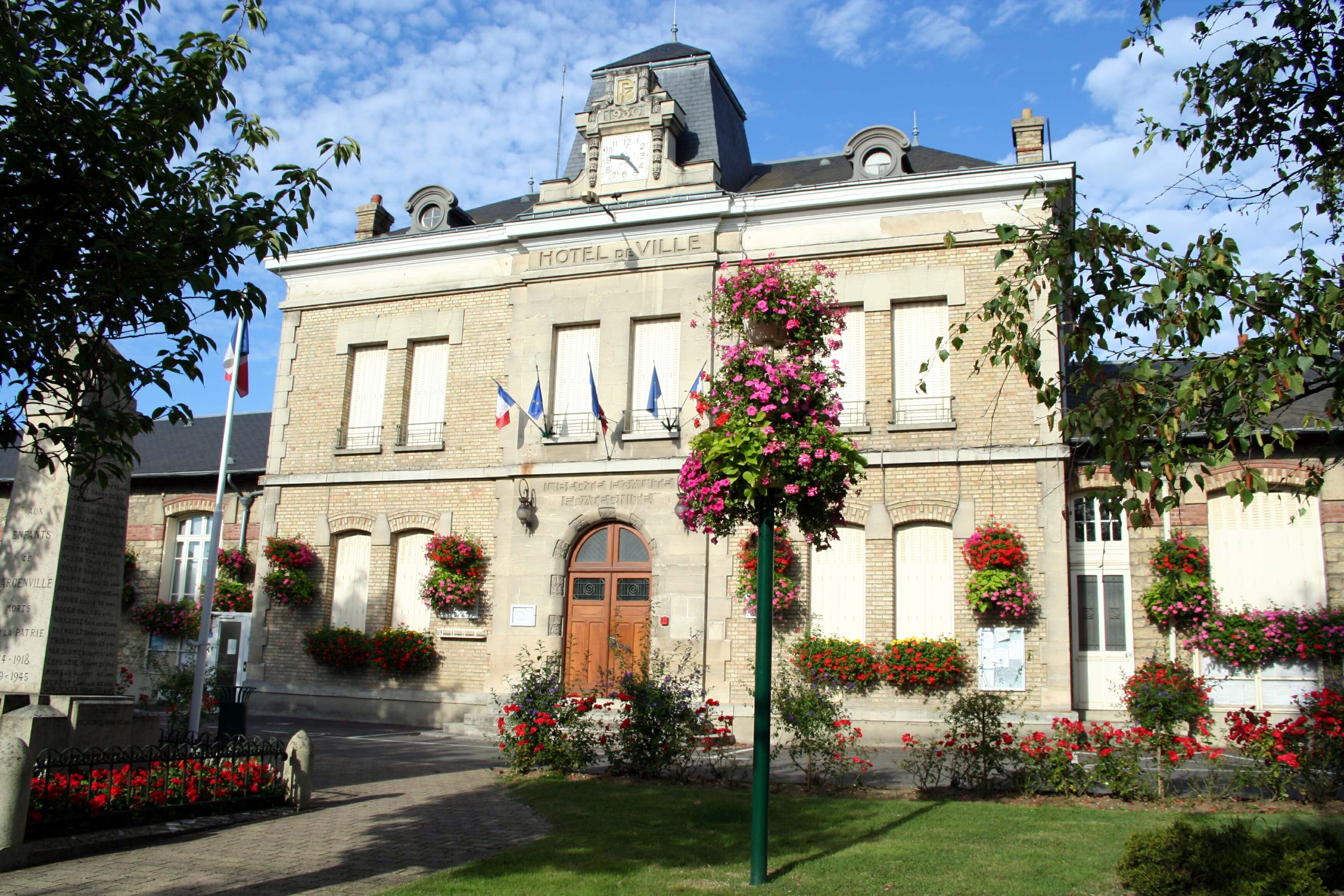 Mairie de Gargenville, Yvelines (France)